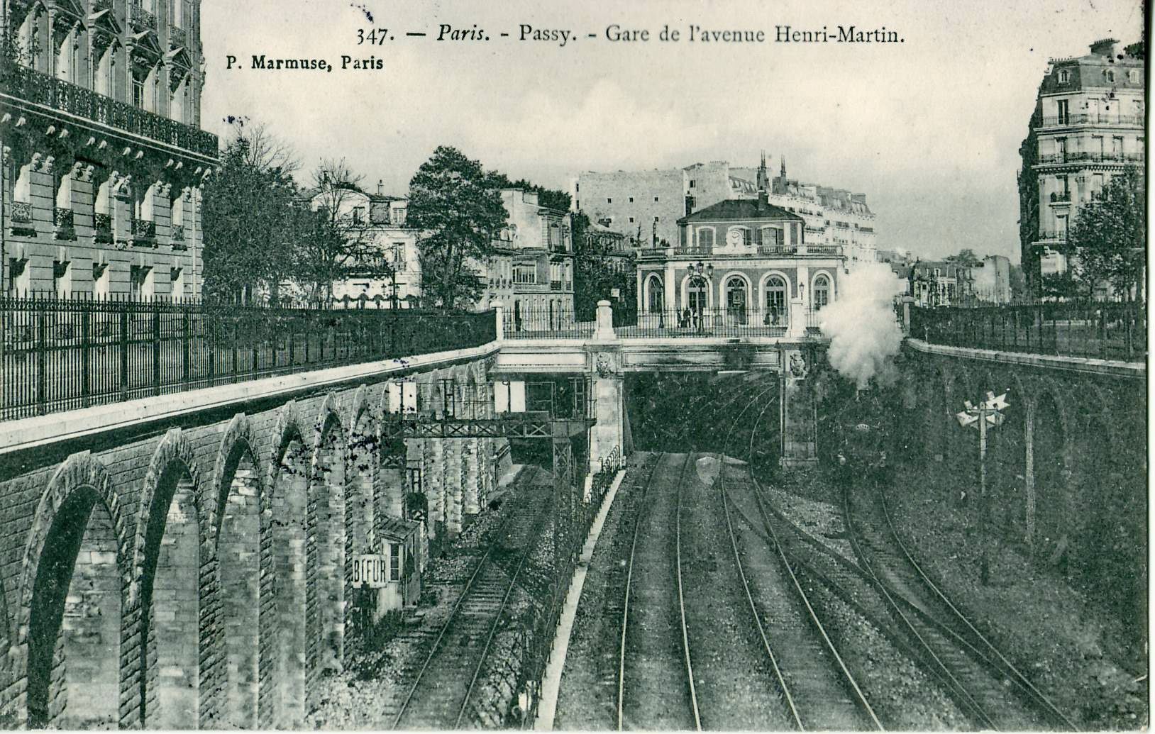 Carte postale ancienne éditée par Marmuse, n°347 PARIS - Passy - Gare de l'avenue Henri-Martin